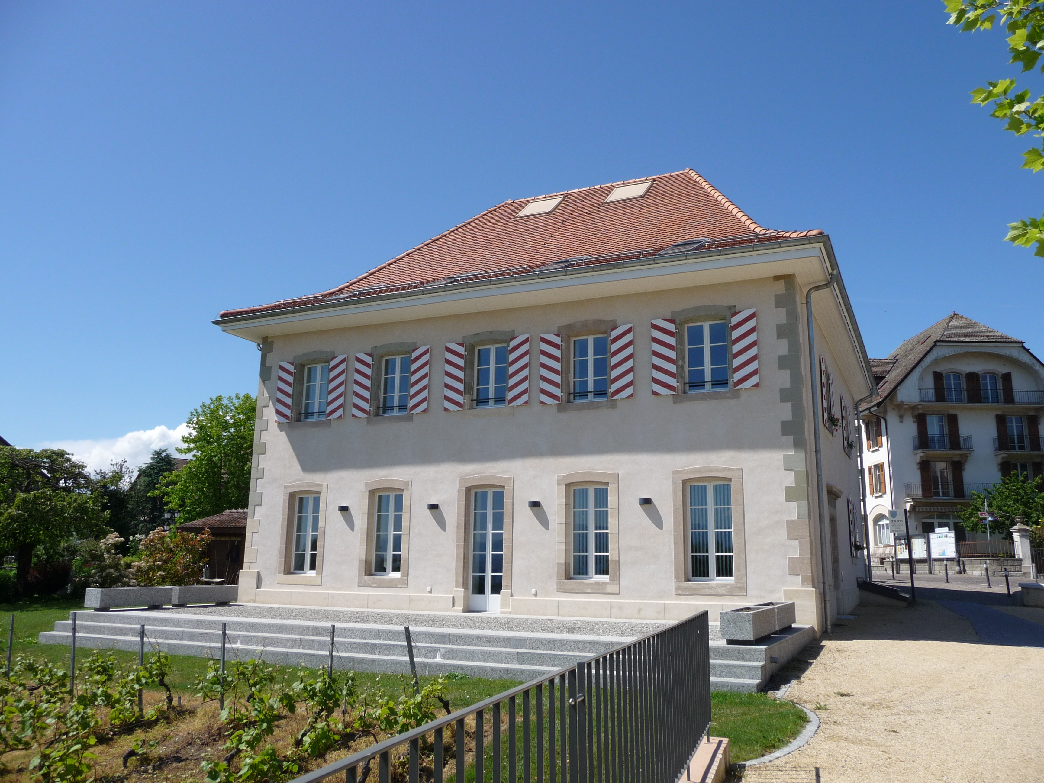 St-Sulpice